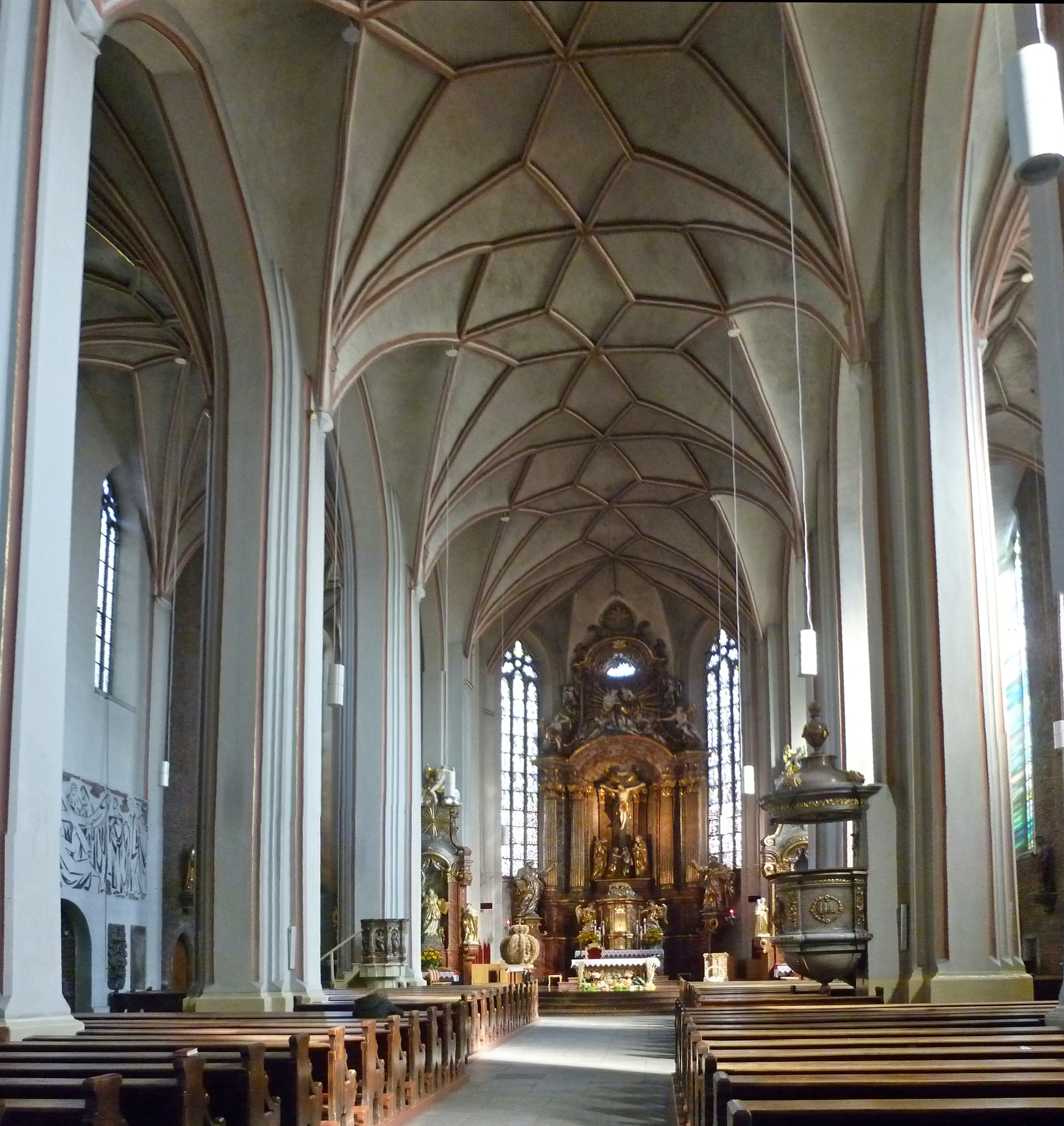 Kathedrale zum Heiligen Kreuz in Oppeln in Schlesien